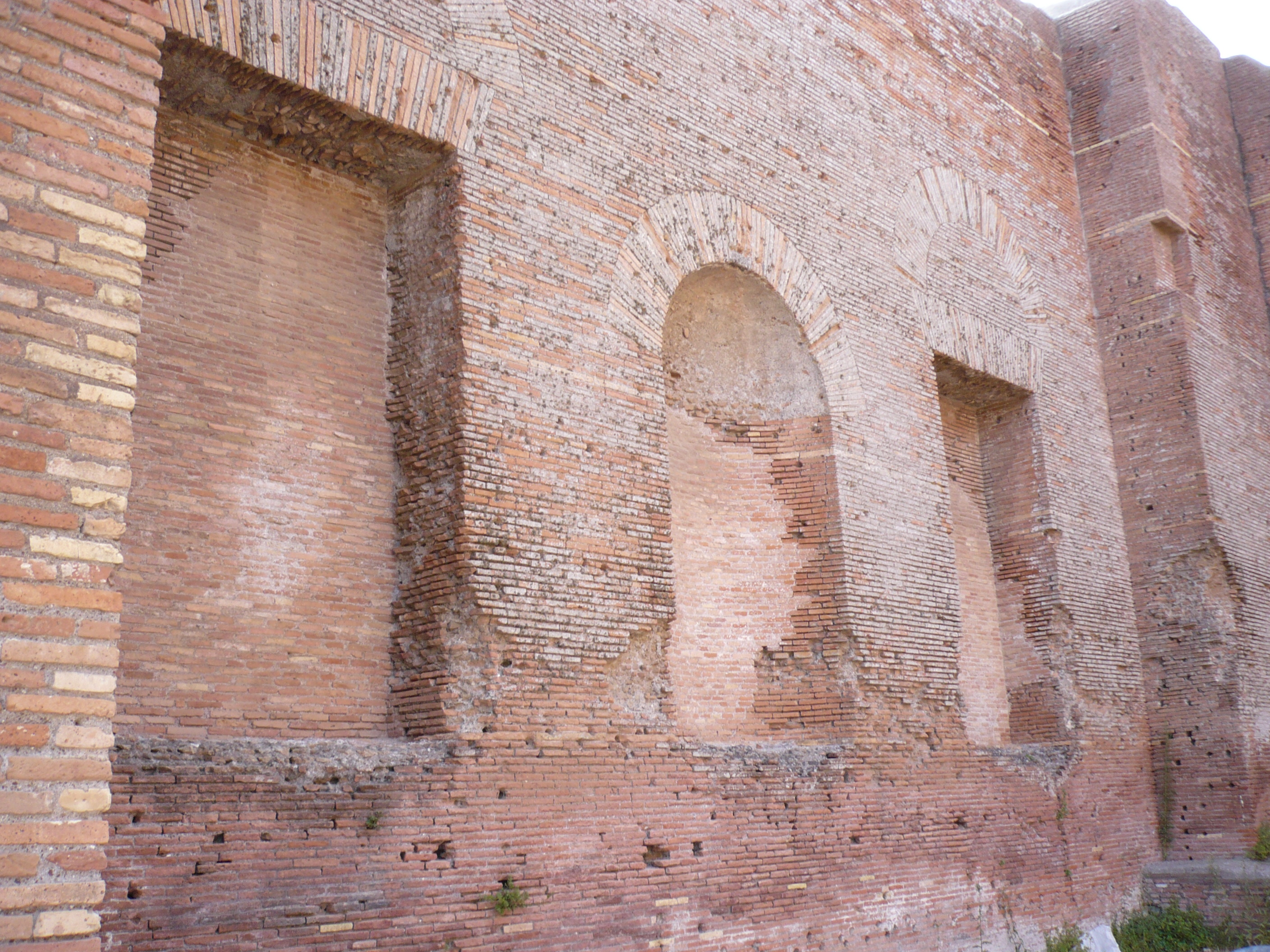 Ostia Antica, Capitolium - inside.